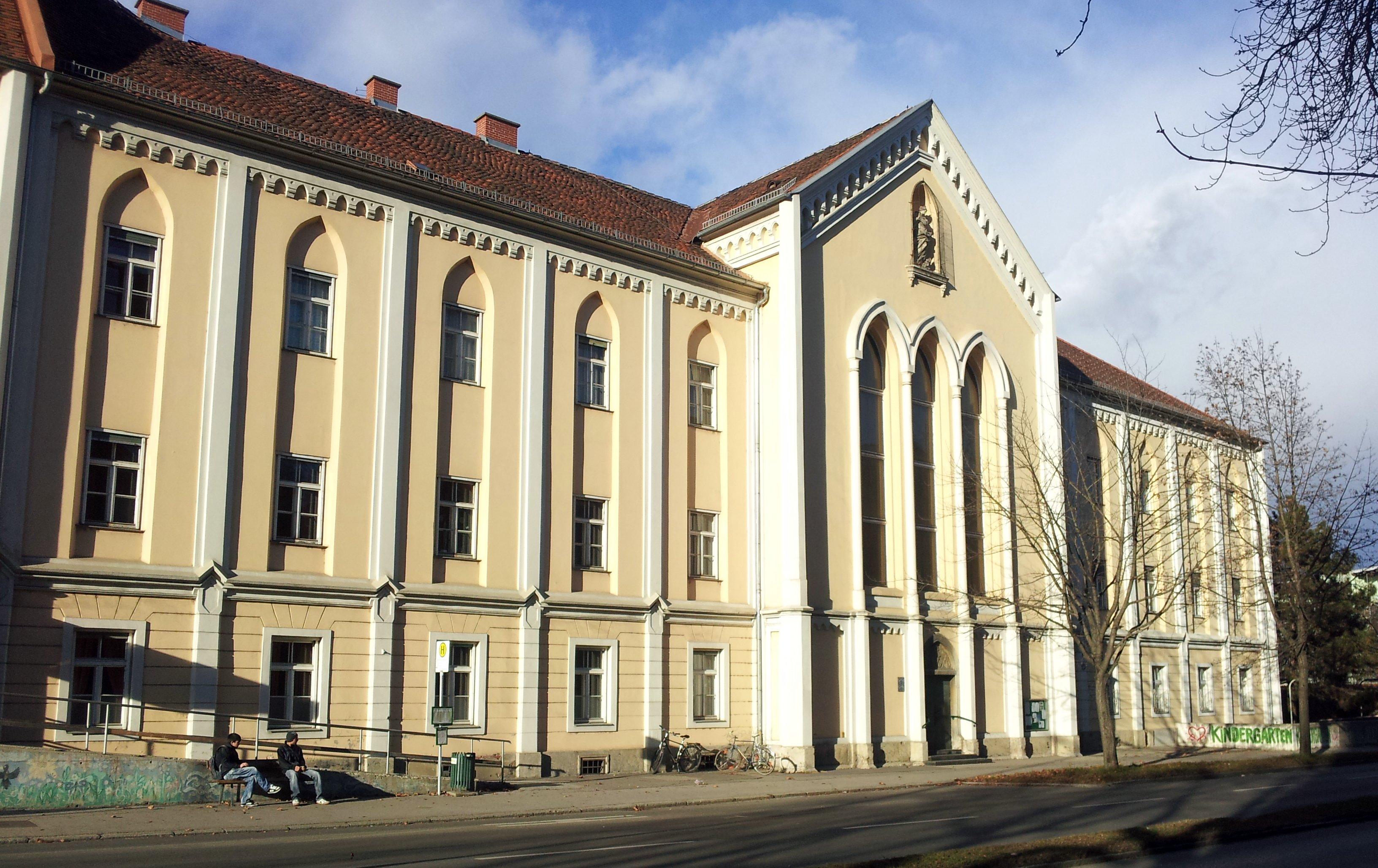 Kloster und Kirche der Frauen vom Guten Hirten, Schule für körperbehinderte Kinder